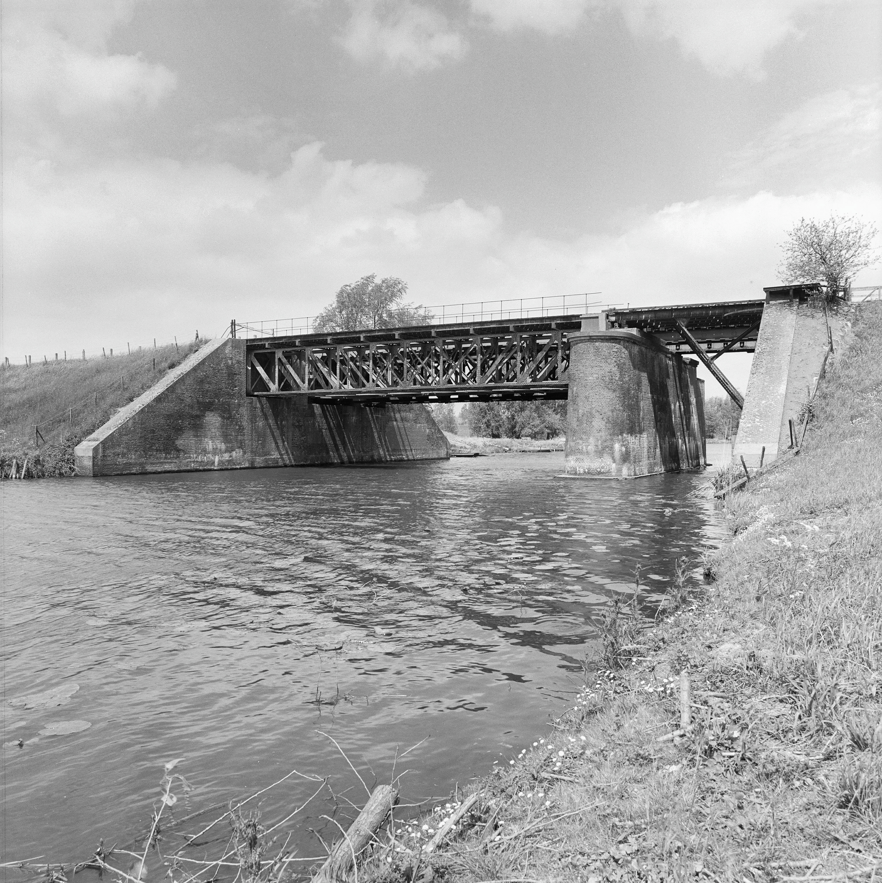 VERDEDIGINGSWERKEN: Exterieur OVERZICHT SPOOR EN KRAANBRUG